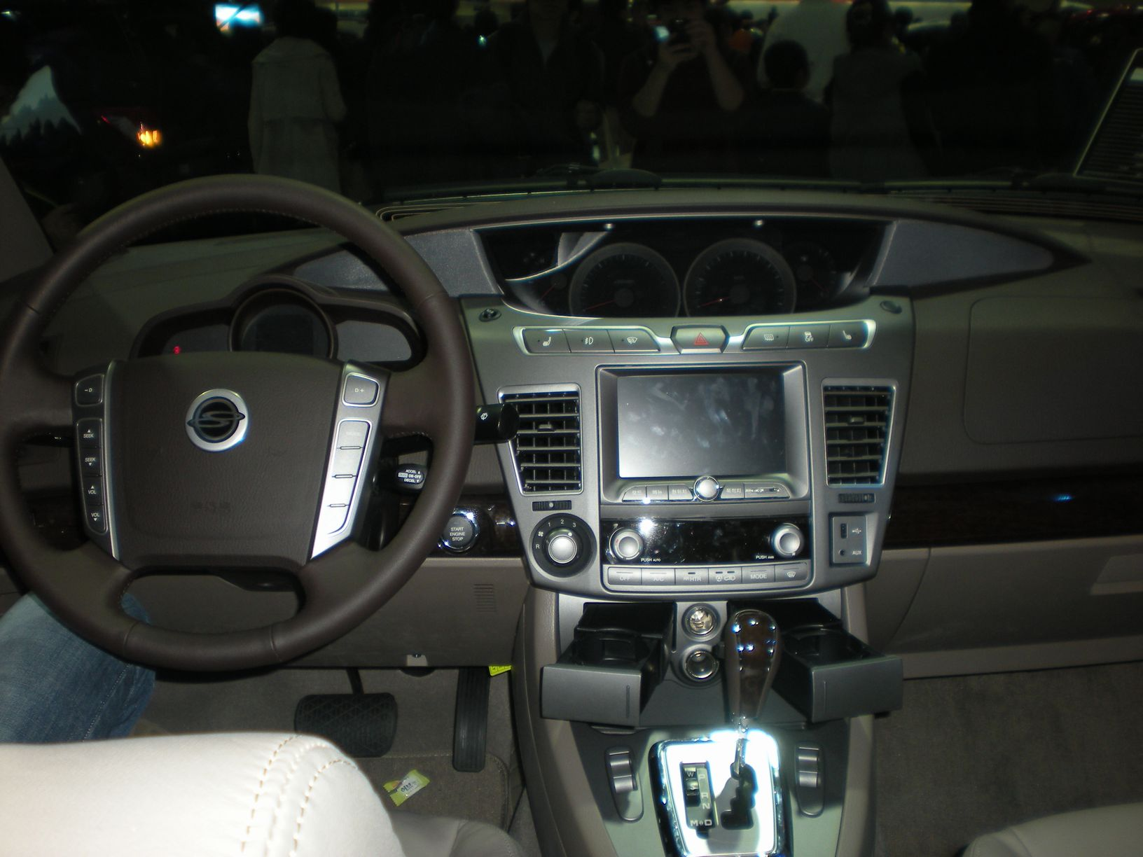 SSANGYONG KORANDO